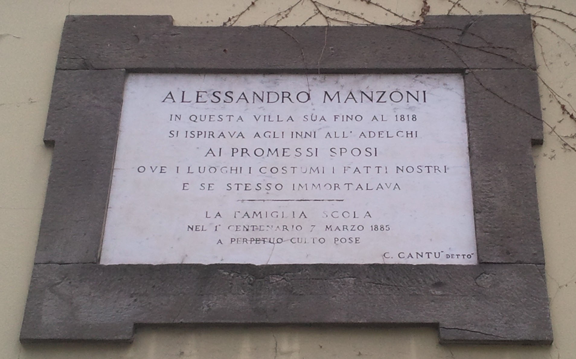 Sul muro esterno della Villa Manzoni a Lecco è posta questa targa in pietra per commemorare i lavori svolti dal poeta in questo edificio. La targa così recita: «ALESSANDRO MANZONI / in questa villa sua fino al 1818 / si ispirava agli inni all'adelchi / AI PROMESSI SPOSI / ove i luoghi i costumi i fatti nostri / e se stesso immortalava. / La famiglia Scola / nel 1° centenario 7 marzo 1885 / a perpetuo culto pose».